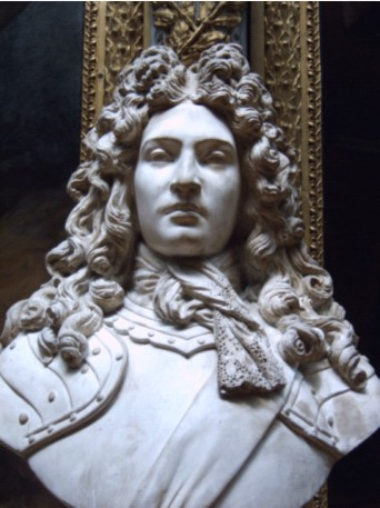 buste de la galerie des batailles du château de Versailles